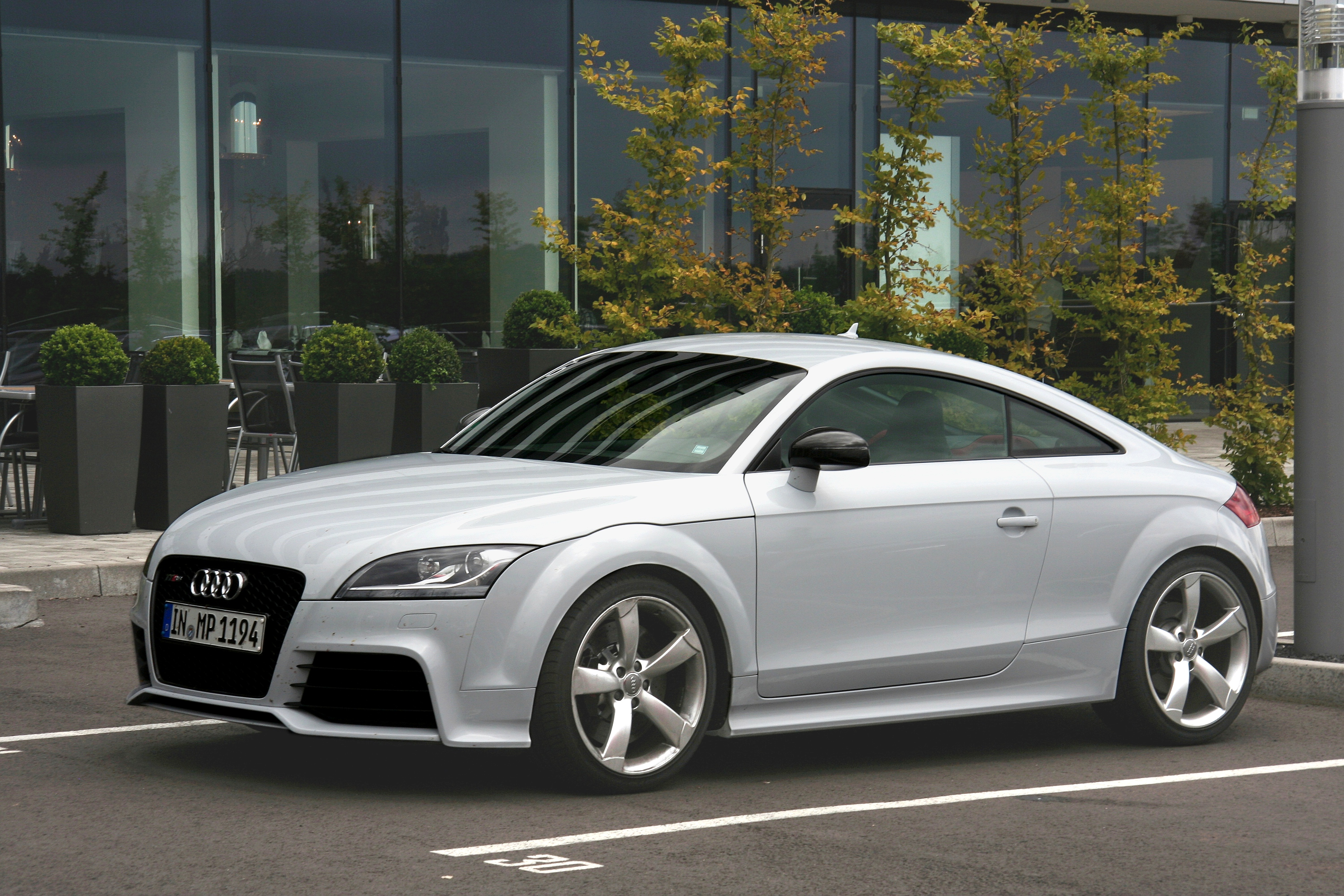 Audi TT, Baujahr 2011